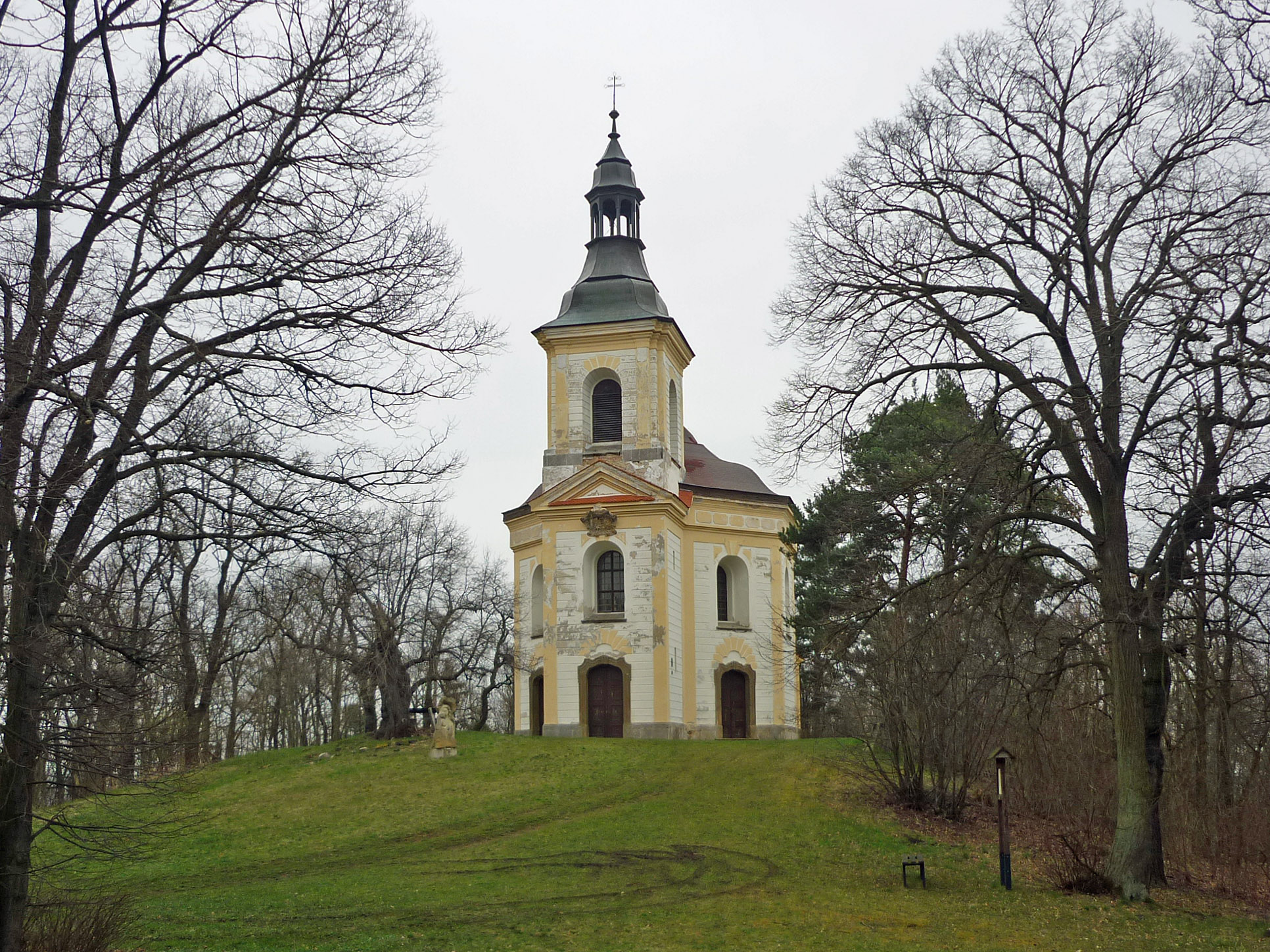 Maria Hilf-Wallfahrtskapelle auf dem Winteritzer Berg (Vintířovský vrch) mit Winteritzer Madonna